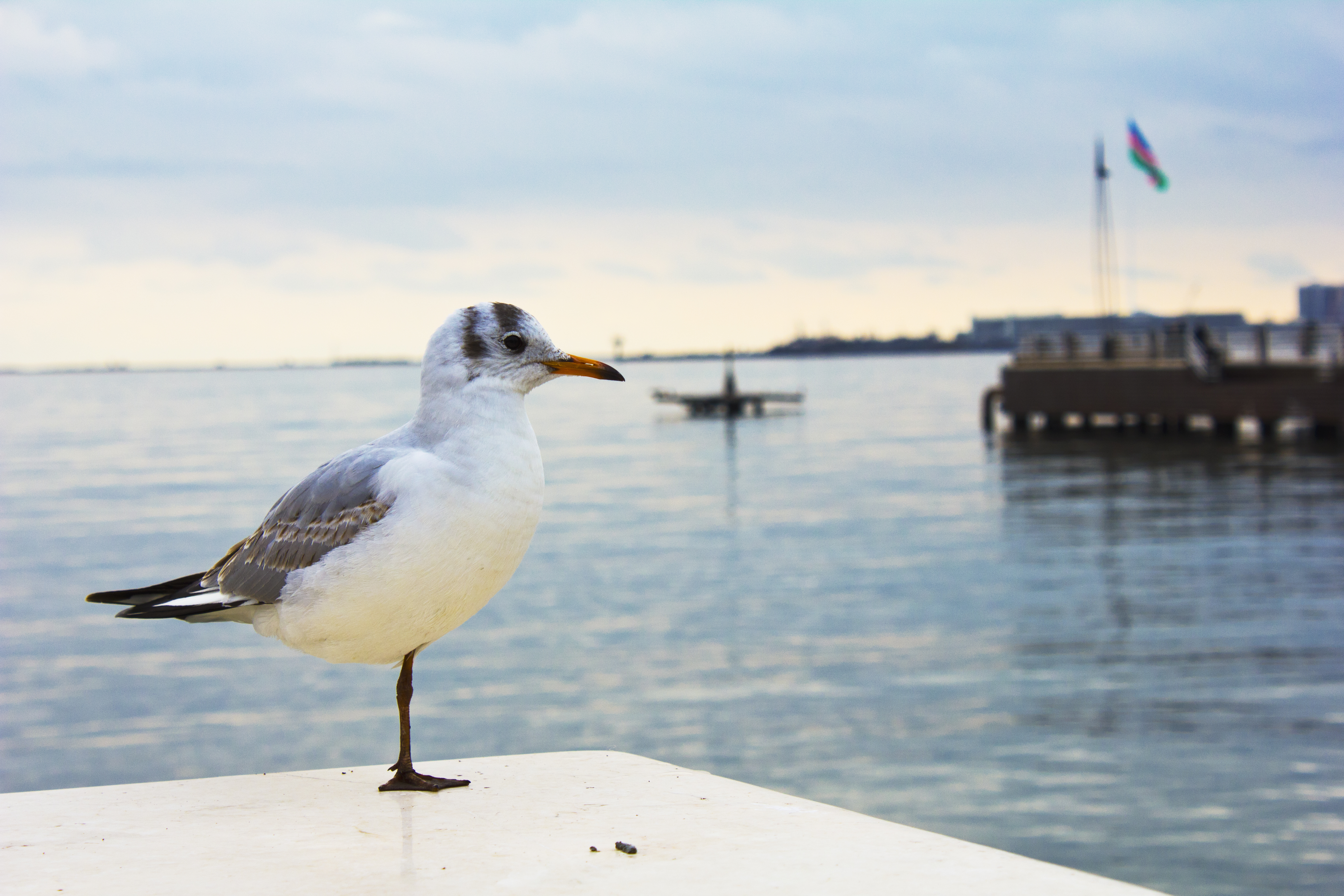 Bakı bulvarında qağayı